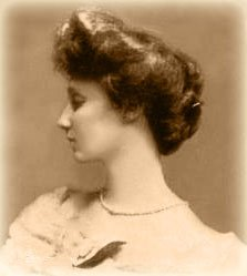 Noël Leslie, Countess of Rothes. Foto realizada de perfil a la popular Condesa del "Titanic"